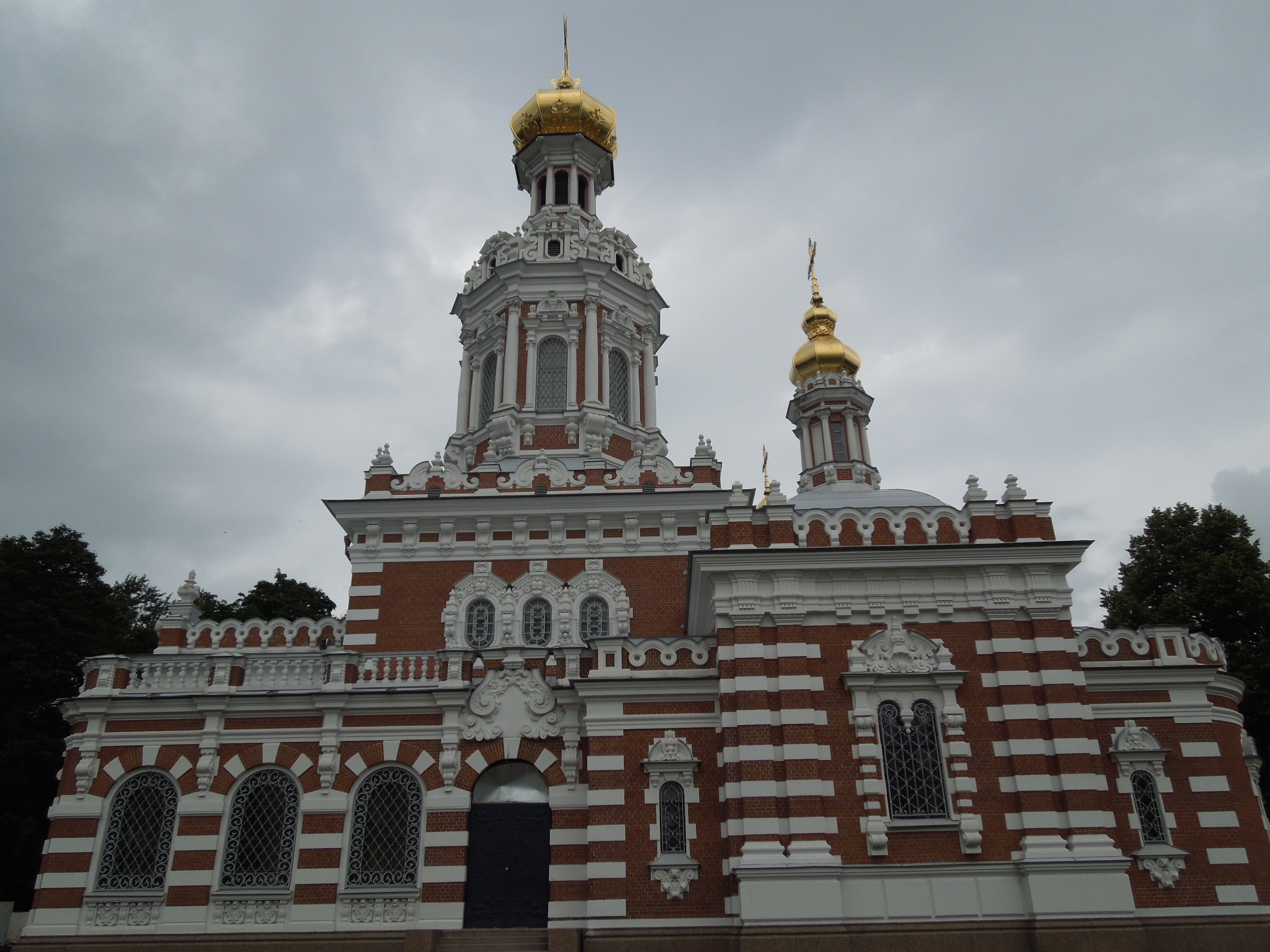 Церковь Воскресения Христова: Камская улица, 11, Василеостровский район, Санкт-Петербург